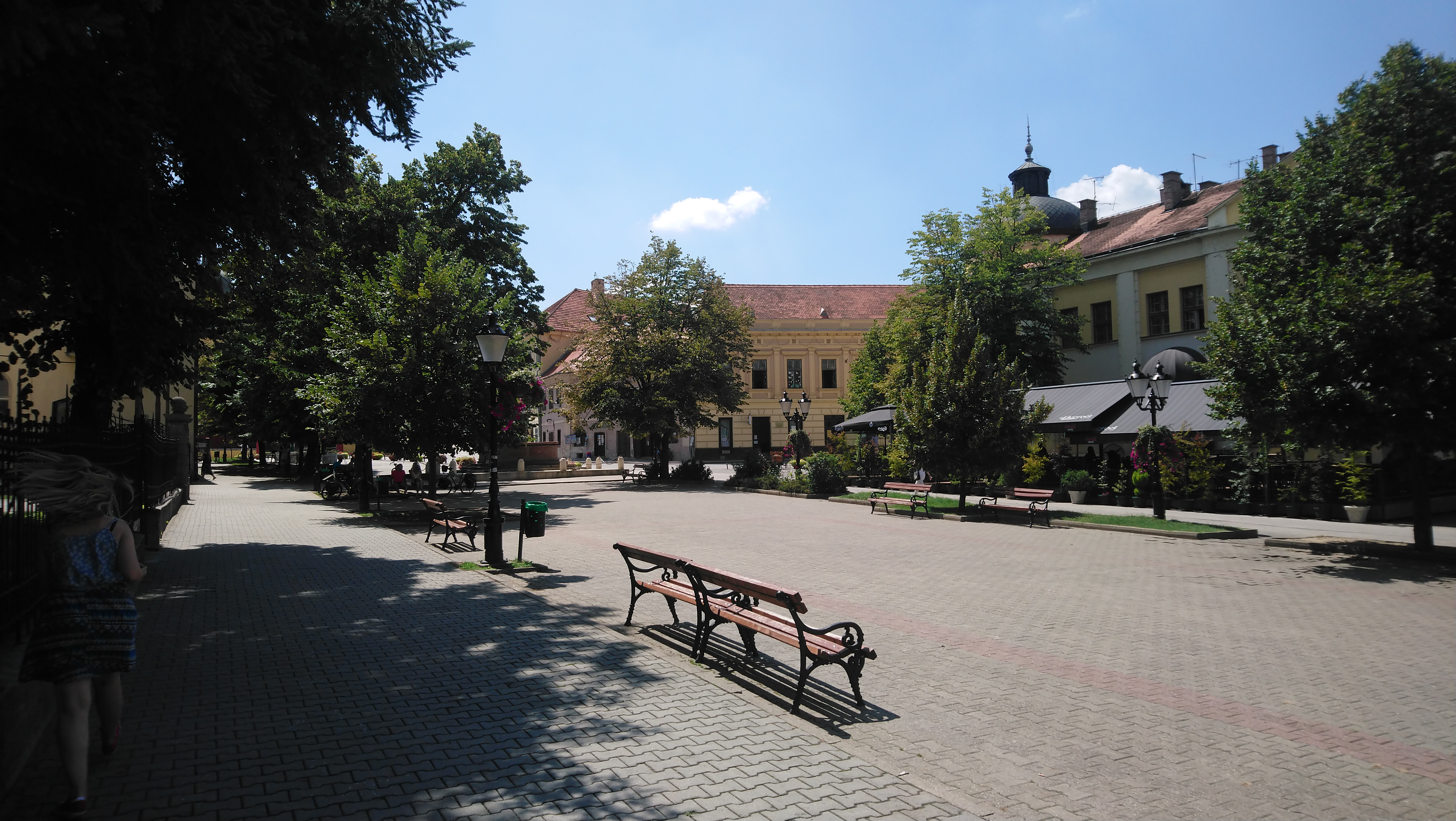 Српски (ћирилица): Трг Бранка Радичевића (Сремски Карловци)